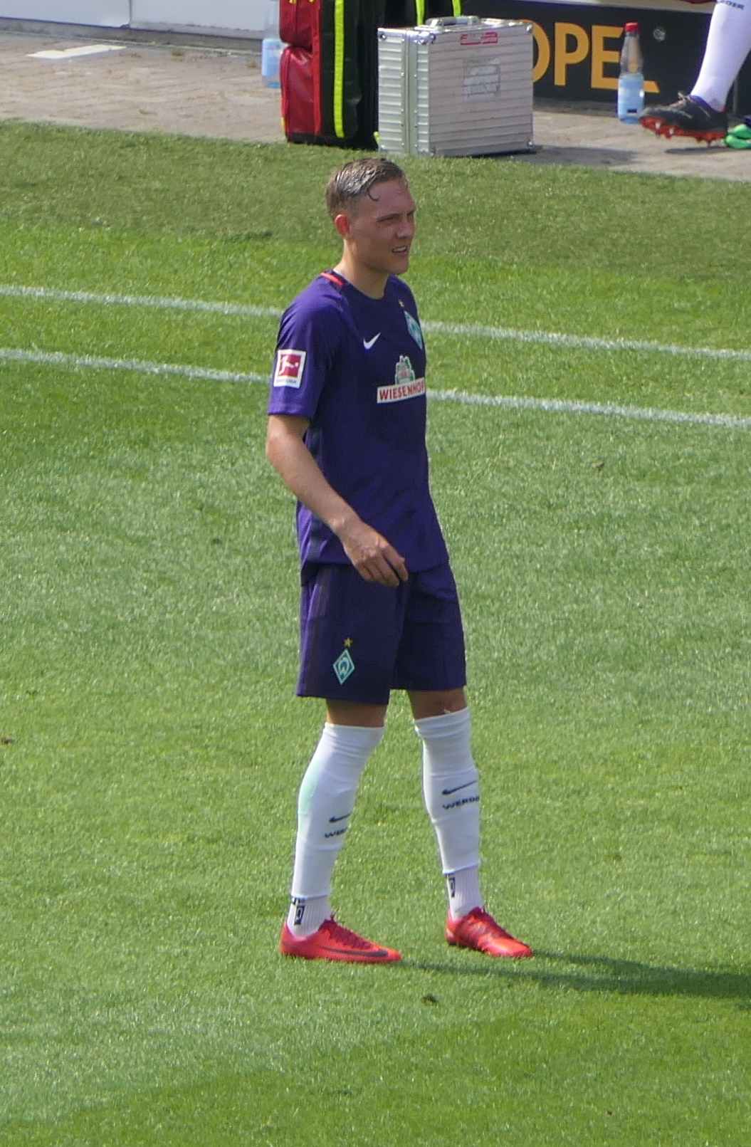 Der Fussballprofi Ludwig Augustinsson im Trikot vom SV Werder Bremen beim Auswärtsspiel gegen den FSV Mainz 05 am 12.05.2018.